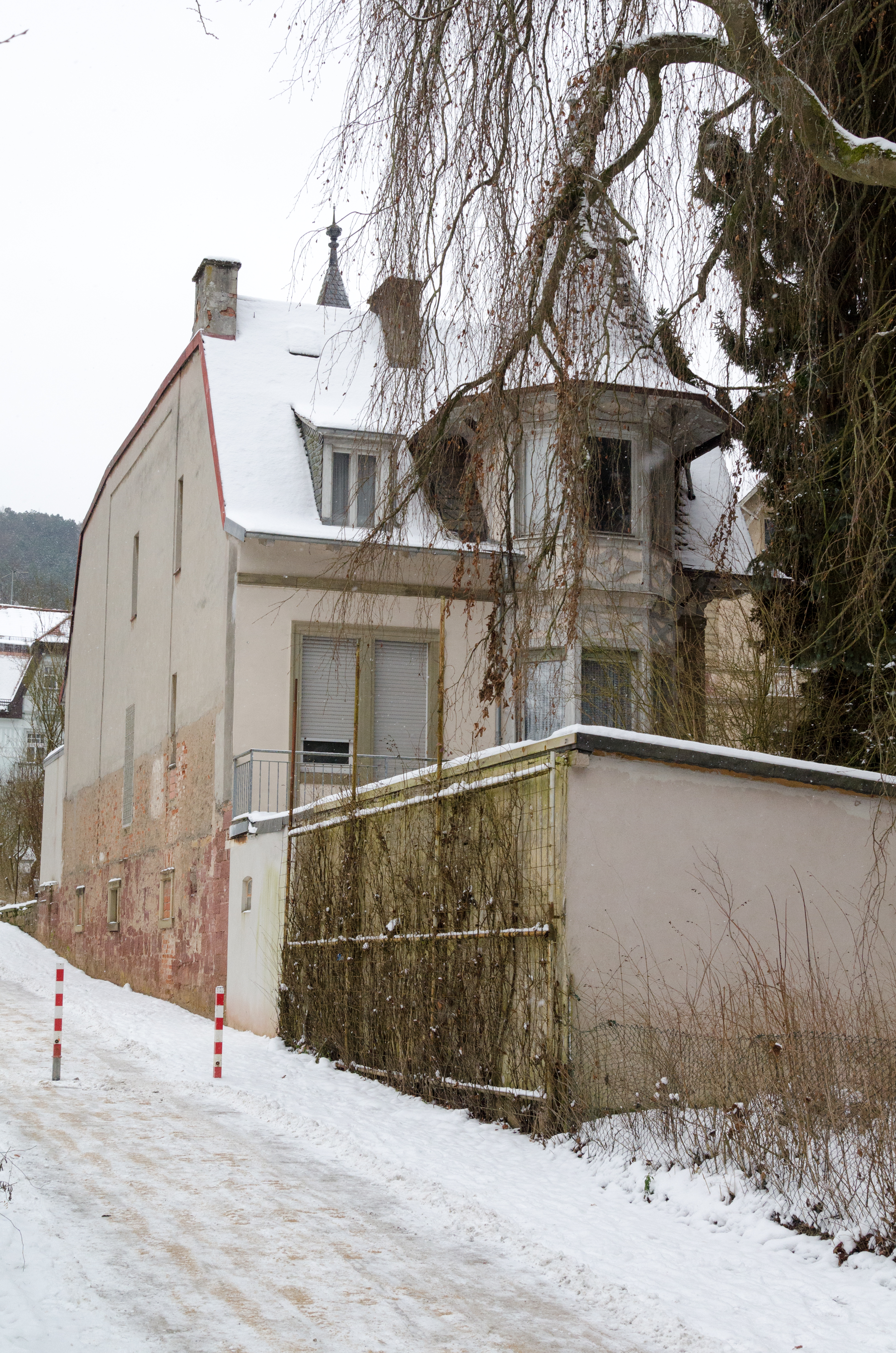 Bad Kissingen, Kurhausstraße 24, Nebnengebäude